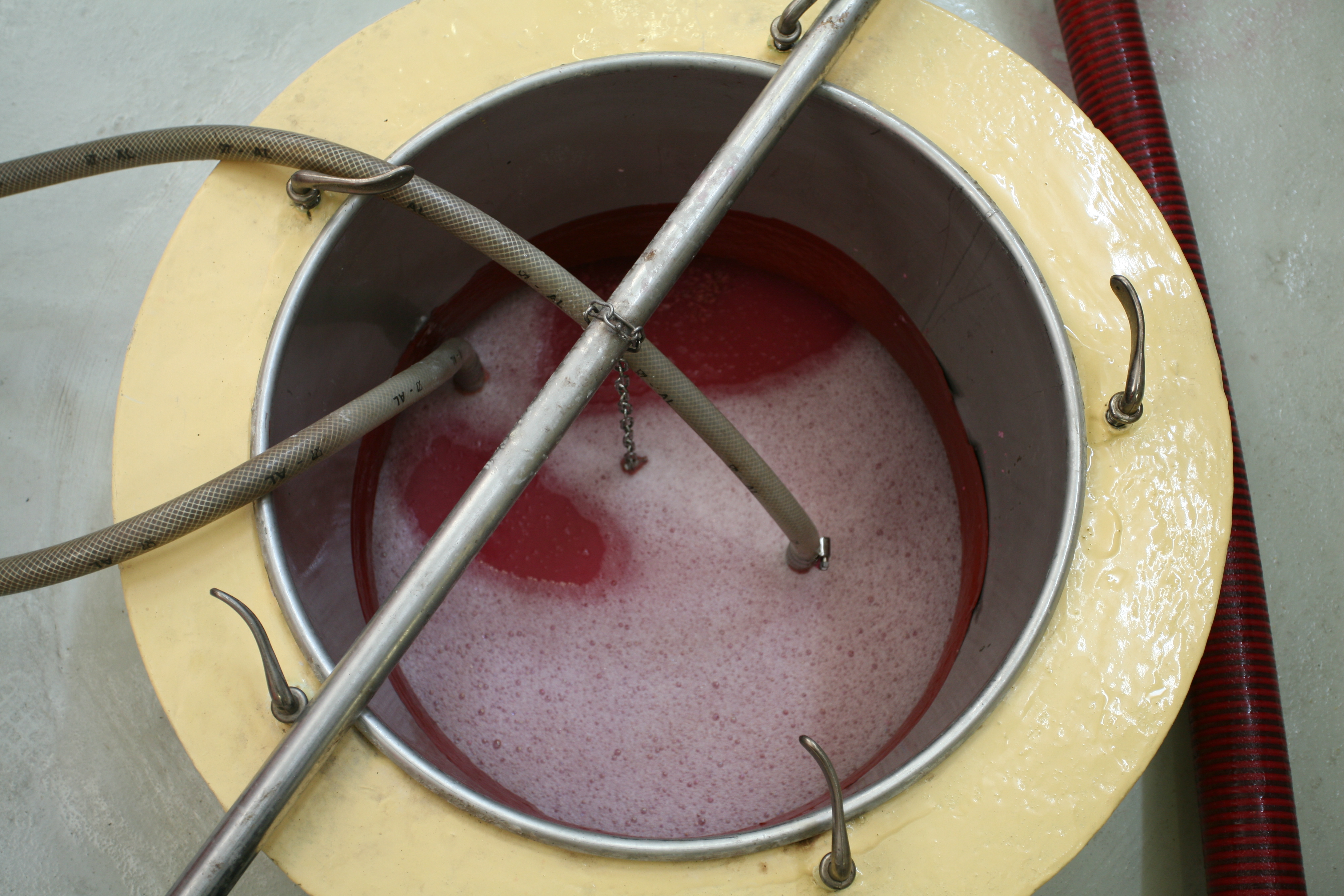 Cuve de rosé, France